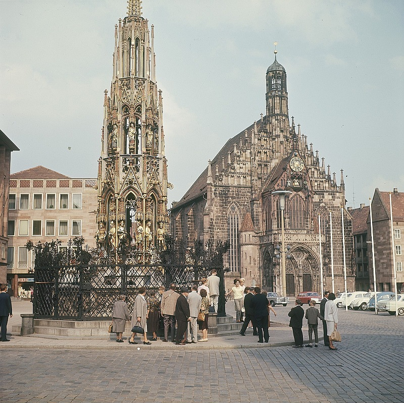 Original image description from the Deutsche FotothekNürnberg. Hauptmarkt mit Schönem Brunnen und Liebfrauenkirche